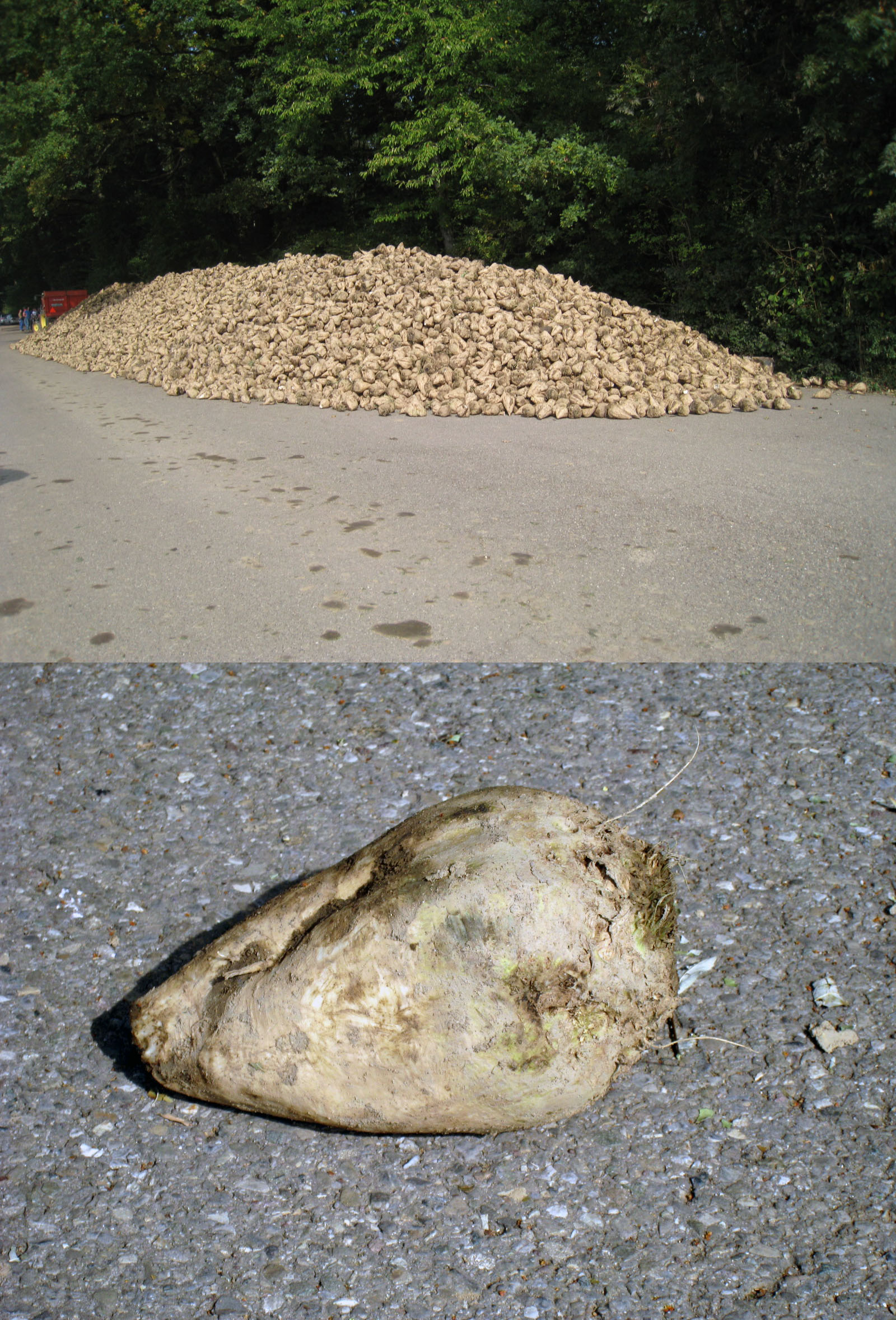 geerntete Zuckerrüben in Rümlang, Kanton Zürich